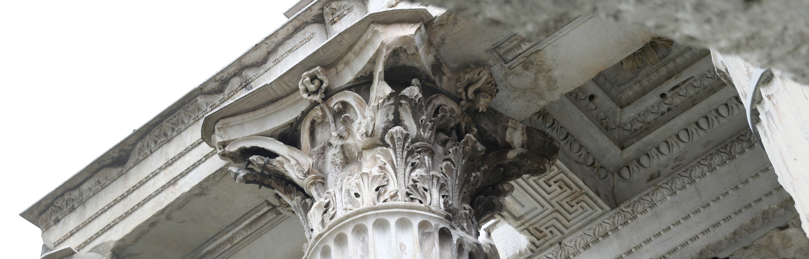 Détail d'un chapiteau corinthien et de la décoration du plafond du temple de Mars vengeur, forum d'Auguste.